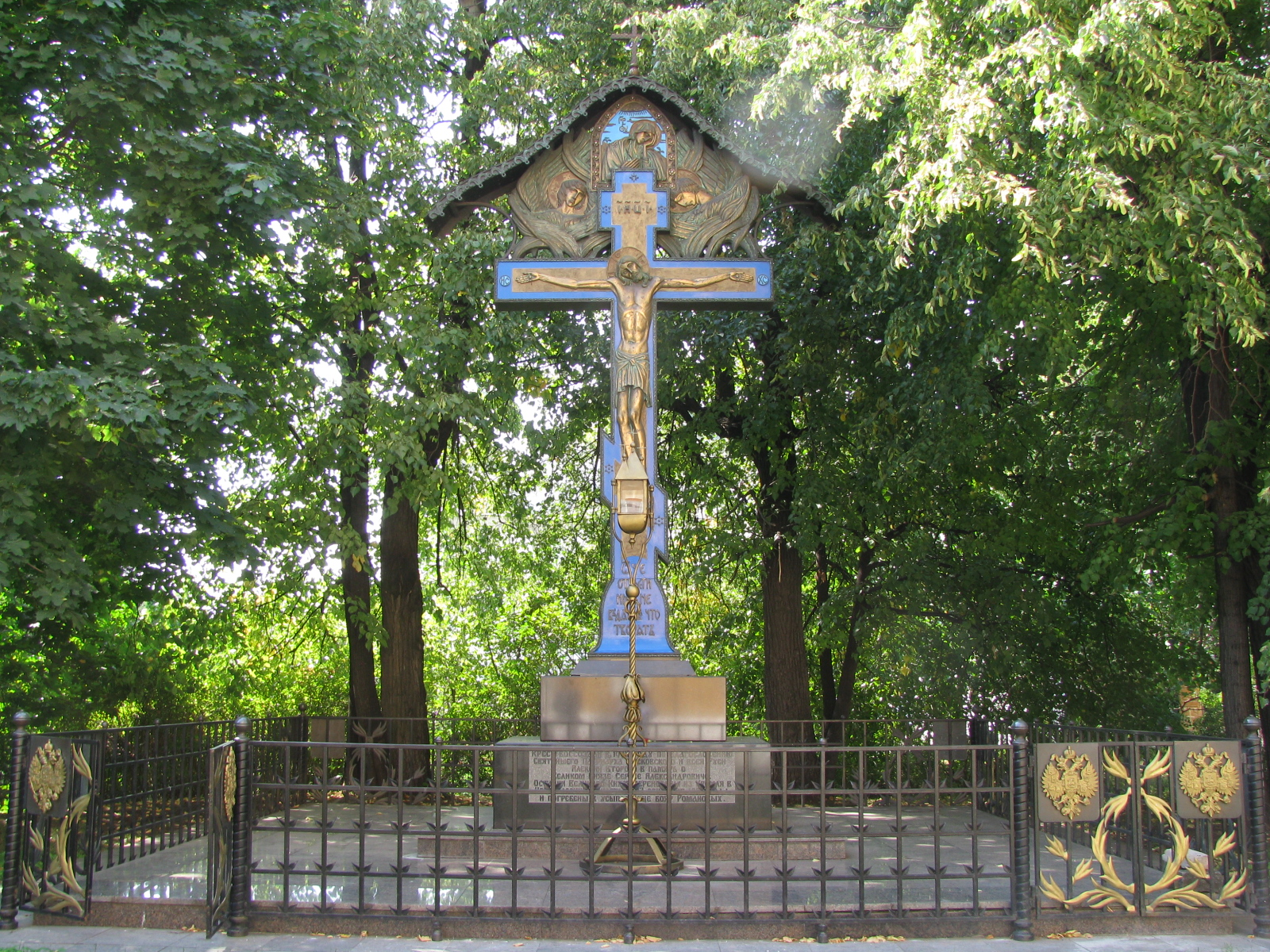 Копия креста-памятника на месте убийства Сергея Александровича. Новоспасский монастырь, Москва